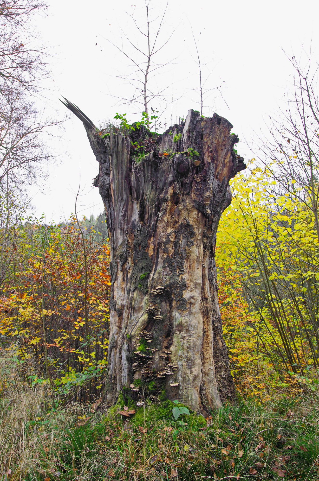 památný strom Buk v Libavském Údolí, torzo, okres Sokolov